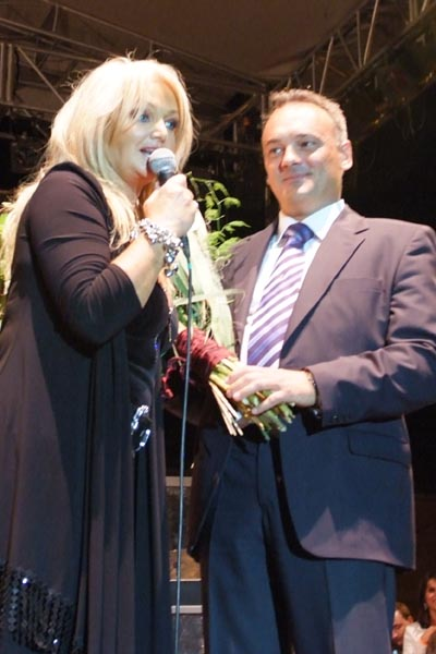 Bonnie Tyler és Borkai Zsolt, Győr polgármestere.